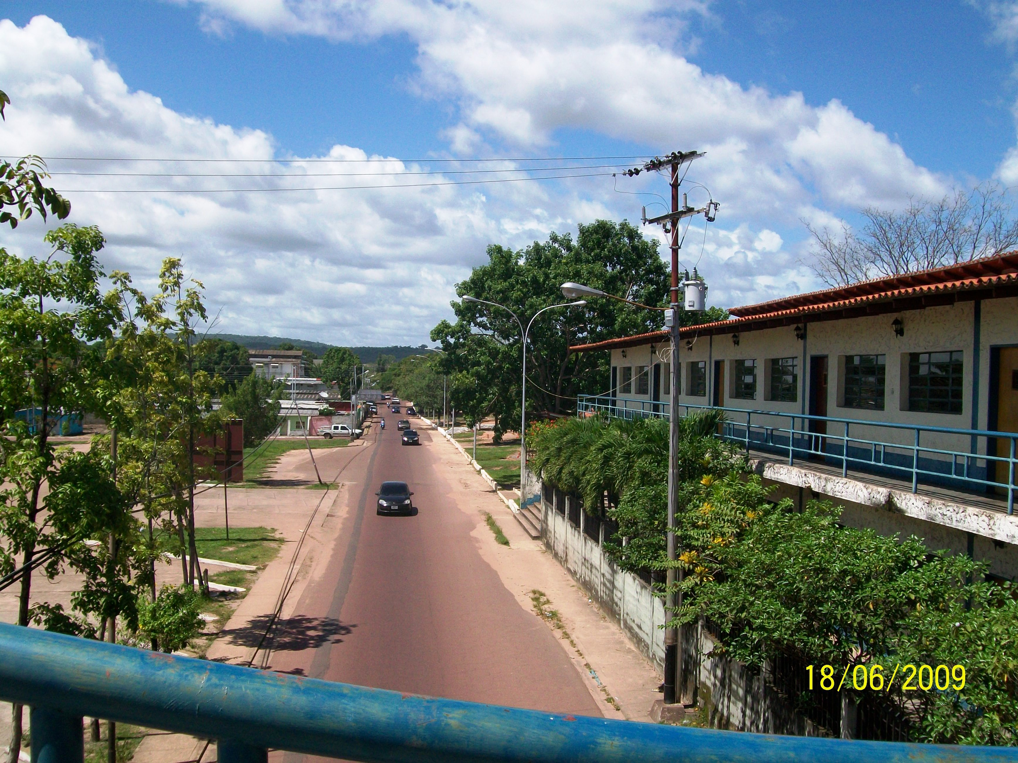 es la tercera mas importante de puerto ayacucho ella atraviesa desde zonas resindendenciales asta llegar al aven.23 de enero,entre sus lados de avenida se encuentra la casa sobre la piedra, la concha acustica entre otros..